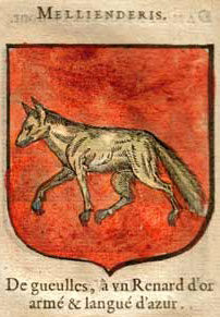 MeliandrisBrezhoneg: Meliandriz